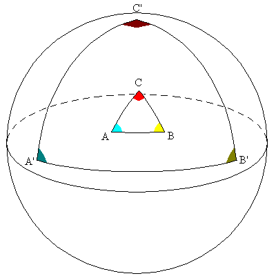 Imagen elaborada por Usuario:Romero Schmidtke Tomada de